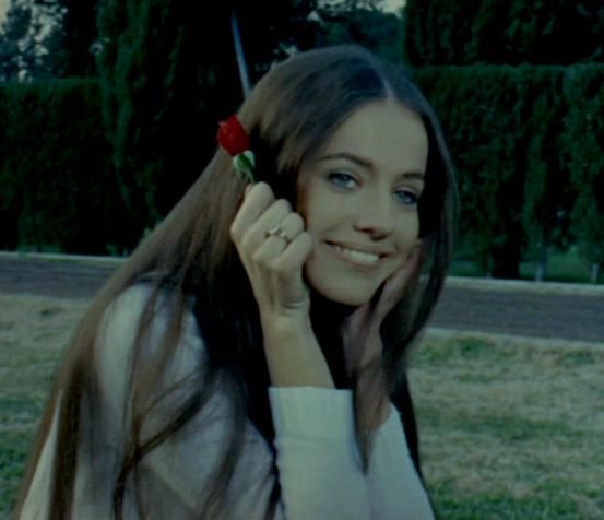 Susanna Martinková in a scene of the film Il ragazzo che sorride